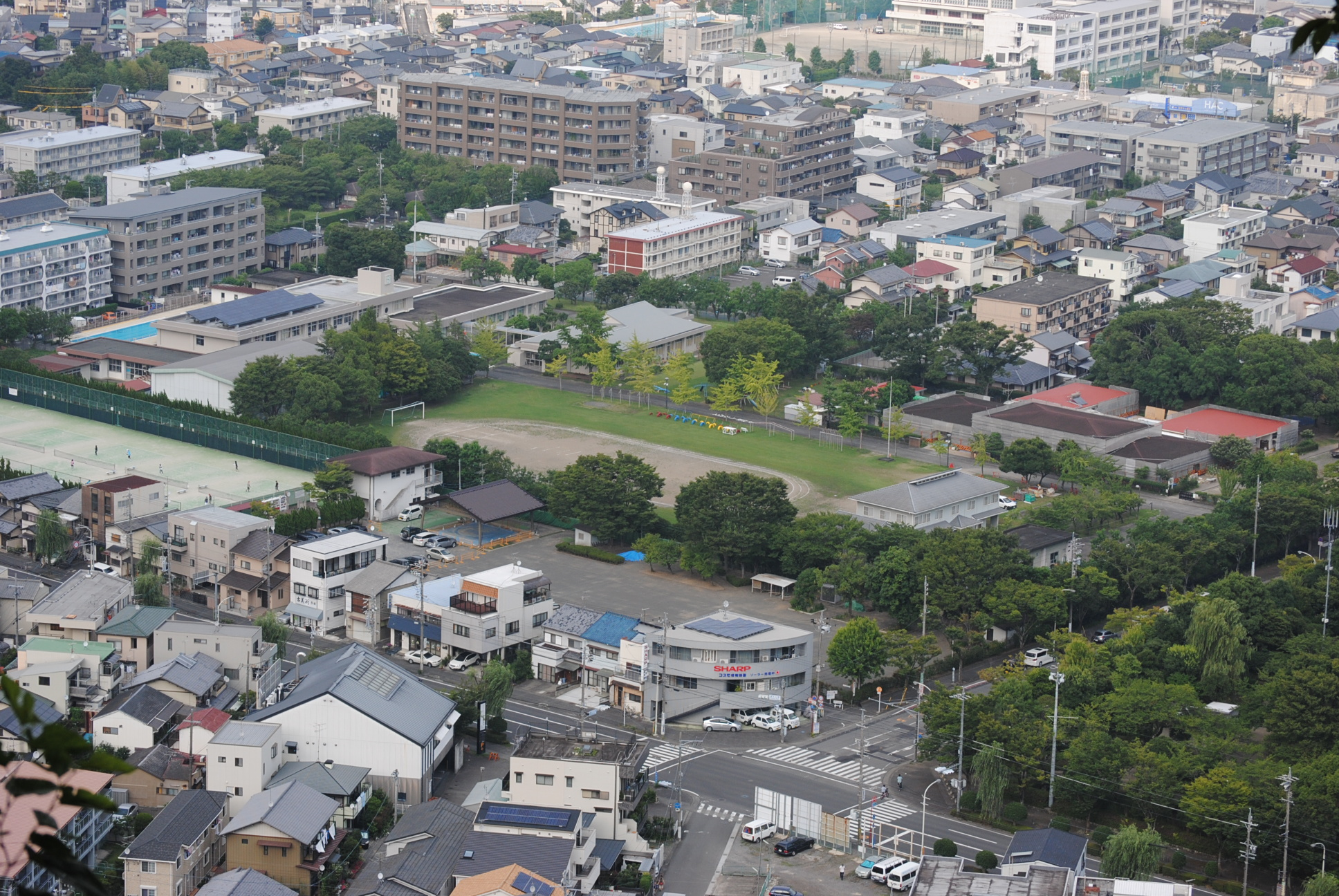 賤機山山頂付近より撮影